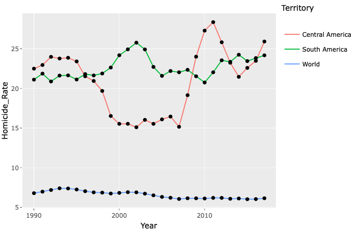 Trend der Tötungsraten von 1990 bis 2017 für: Mittelamerika, Südamerika, Welt